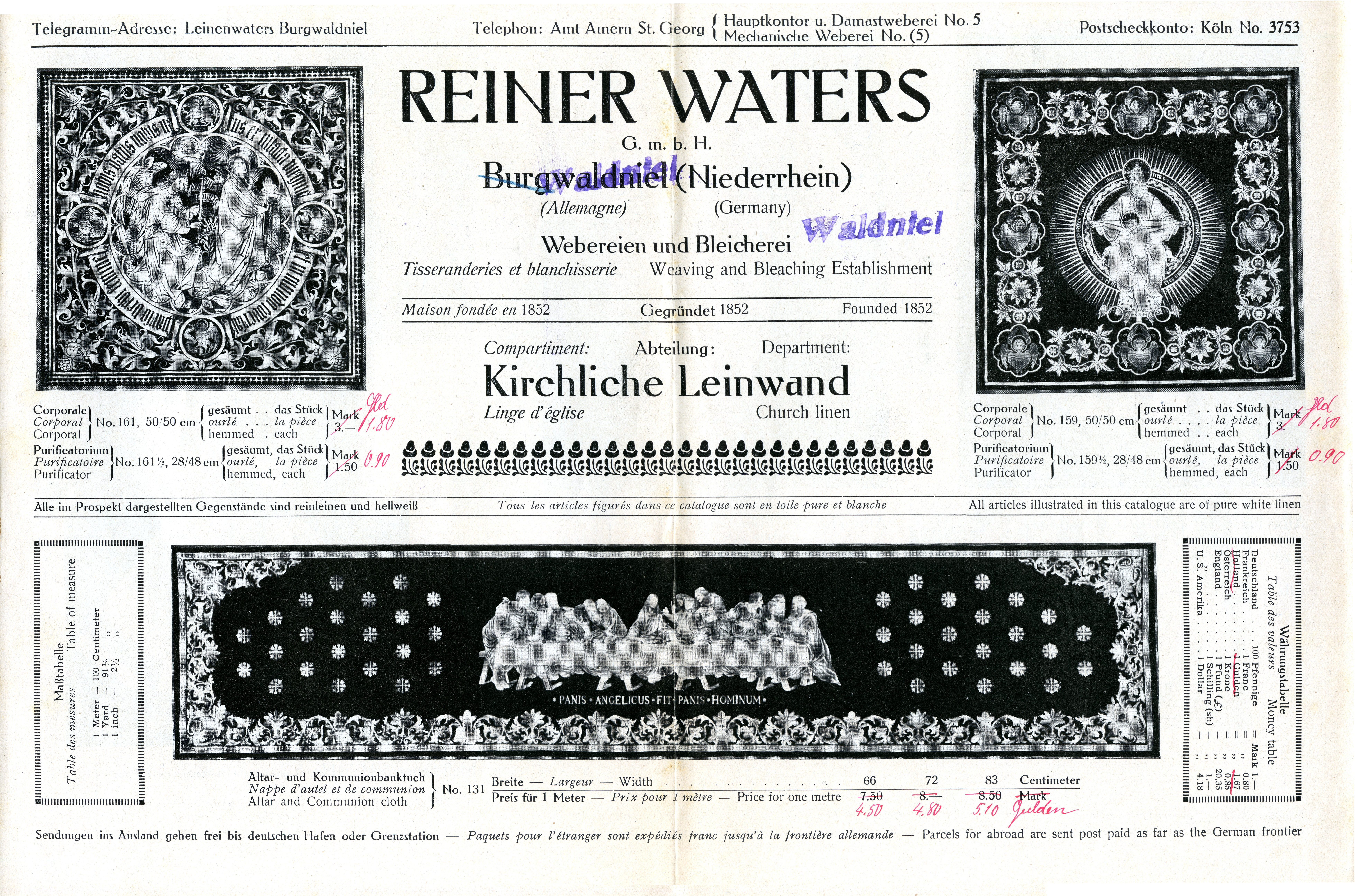 Verkoopbrochure ca. 1920